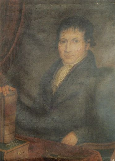 L'Albero degli Albrizzi olio su tela